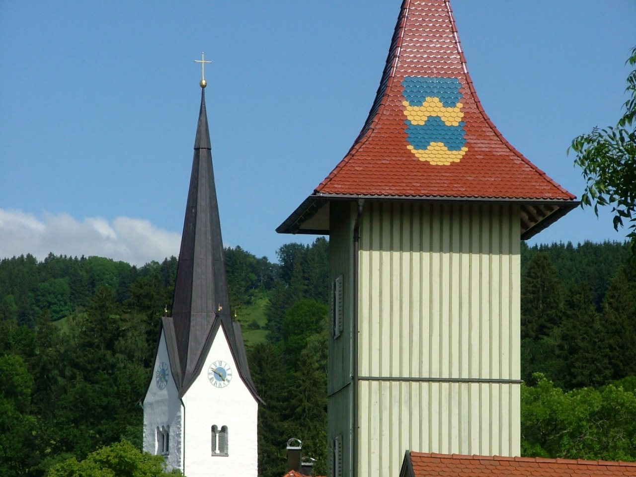 Feuerwehr